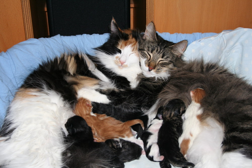 norwegermamas_mit_kitten